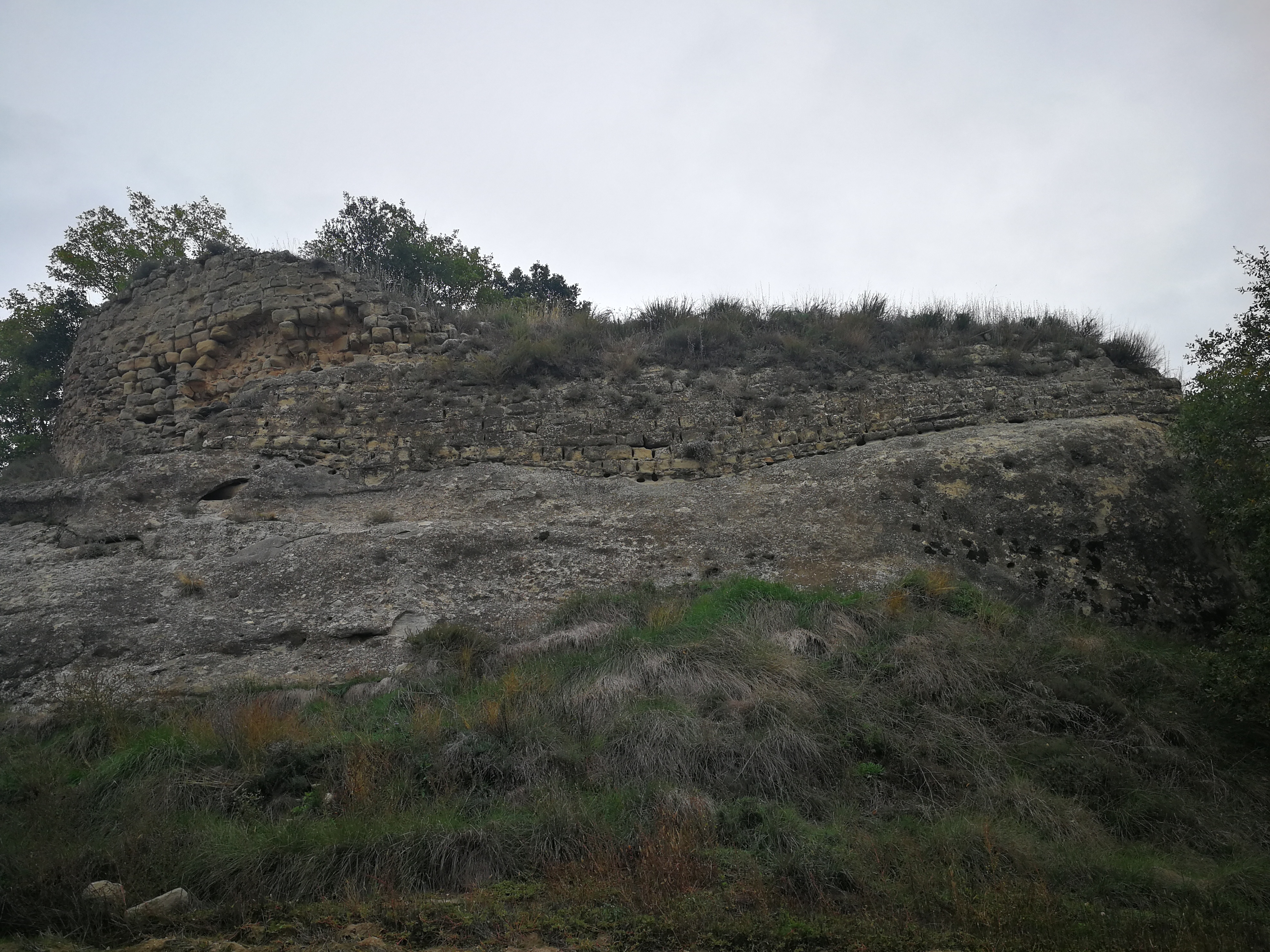 castell de Querol al municipi de Montmajor